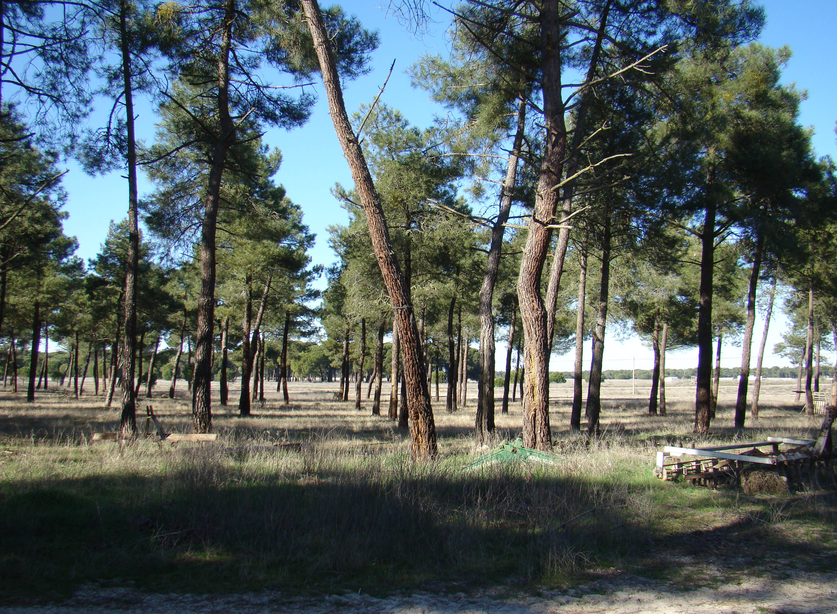 Moraleja de las Panaderas en la provincia de Valladolid, España. Pinares correspondientes a su término.